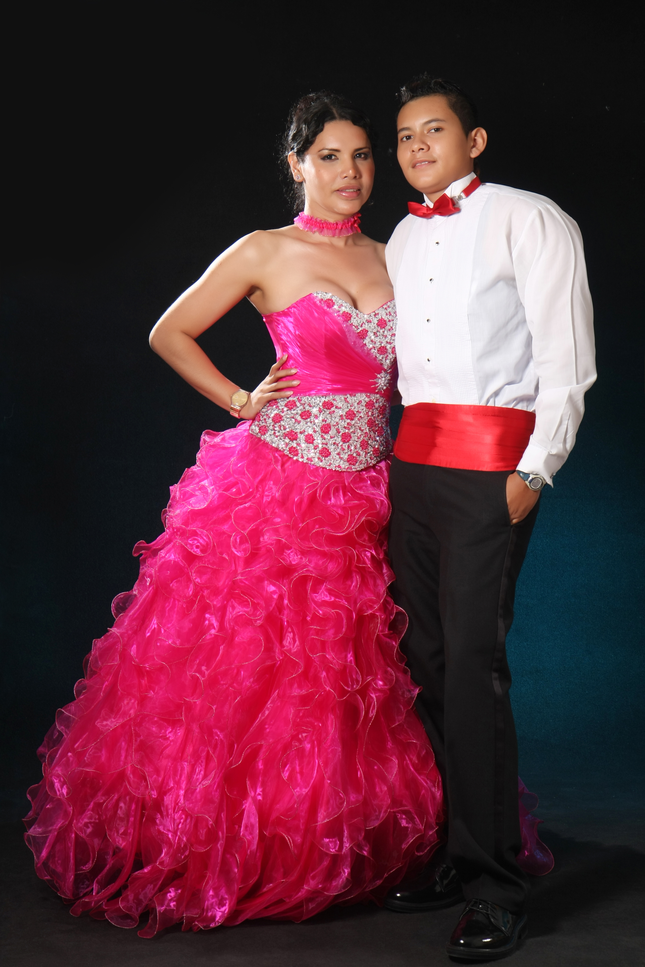 Diane Marie Rodríguez Zambrano y Nicolás Guamanquispe una pareja transexual que registro primera unión de hecho ecuador.